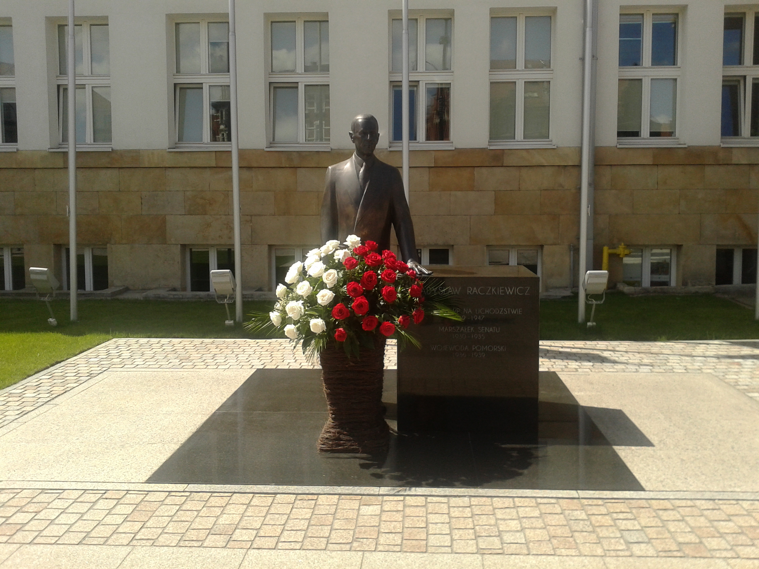 Pomnik Władysława Raczkiewicza w Toruniu - przed Urzędem Marszałkowskim inskrypcja: WŁADYSŁAW RACZKIEWICZ/ PREZYDENT RP NA UCHODŹSTWIE/ 1939-1947 MARSZAŁEK SENATU/ 1930-1935/ WOJEWODA POMORSKI/ 1936-1939